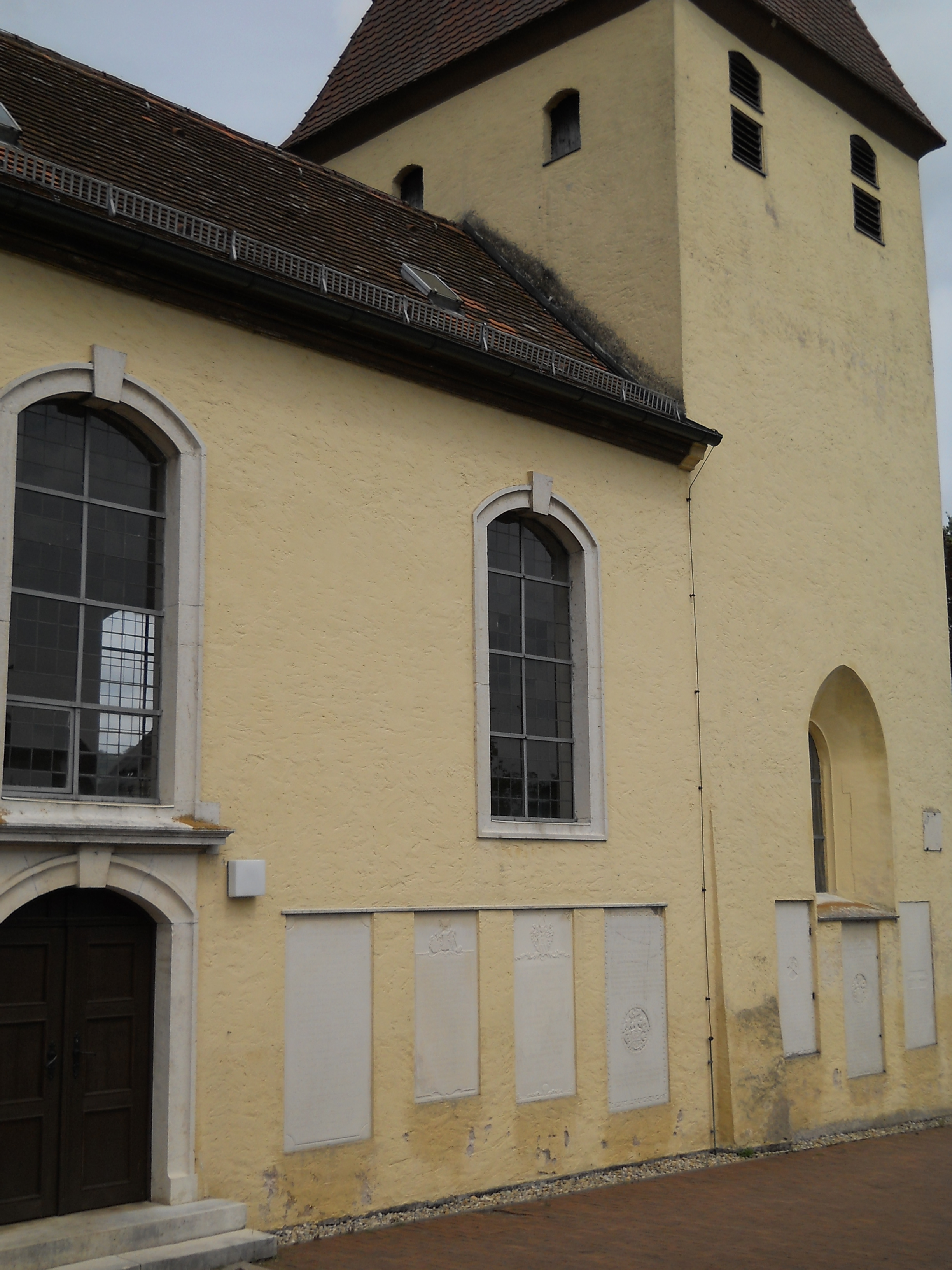 Dietfurt in Mittelfranken, Ortsteil von Treuchtlingen, Johanneskirche